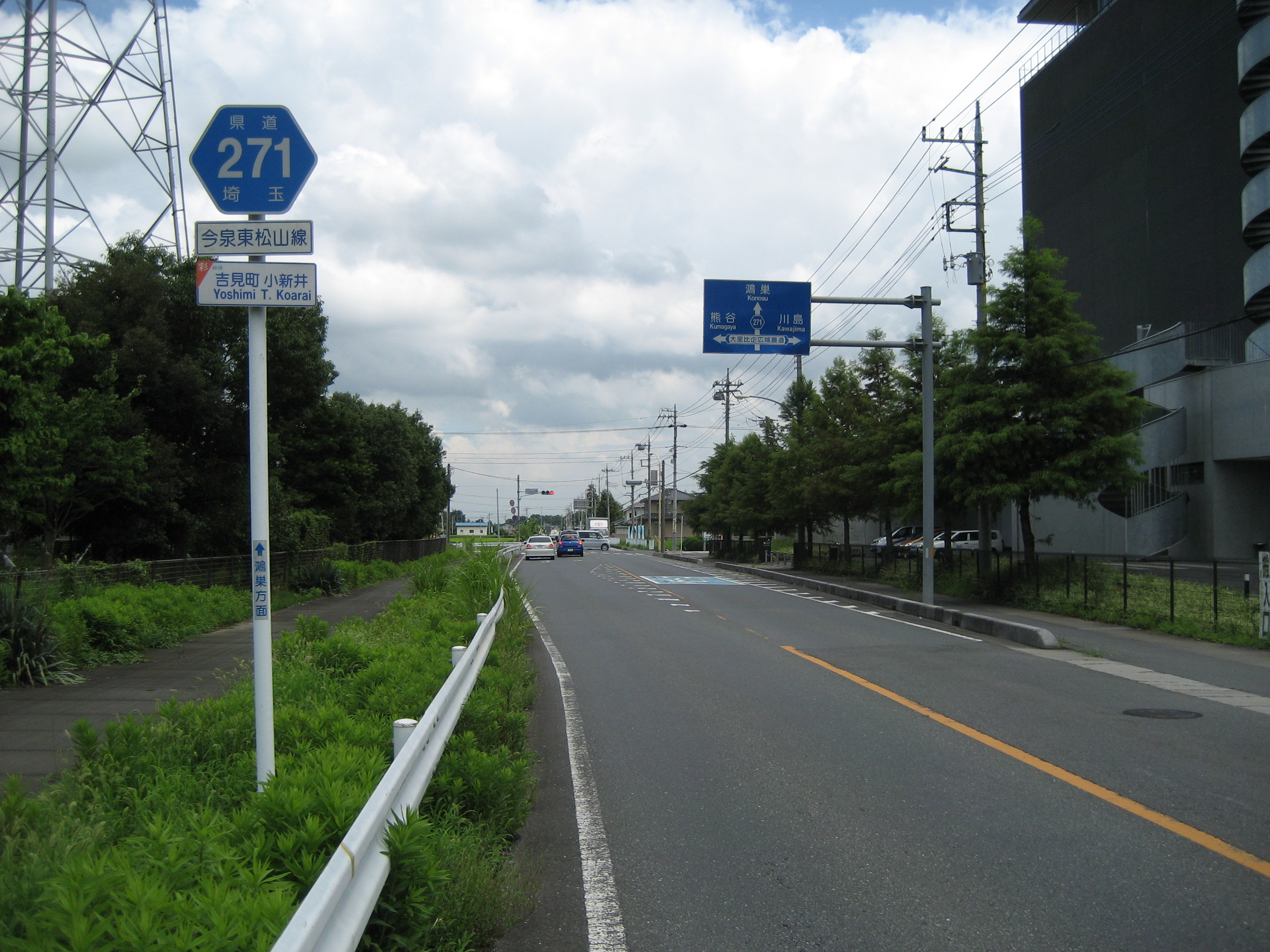 埼玉県道271号線吉見町で撮影